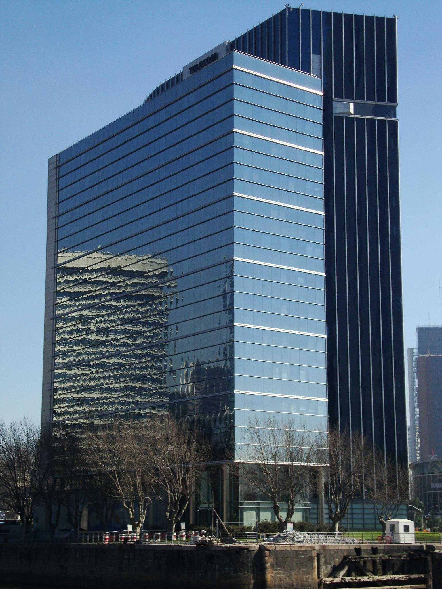 Edificio de Telecom Argentina, visto desde Puerto Madero Este. Ubicación: Av. Alicia Moreau de Justo 50 Arquitecto: Kohn, Pedersen, Fox Associates Año: 1997-98